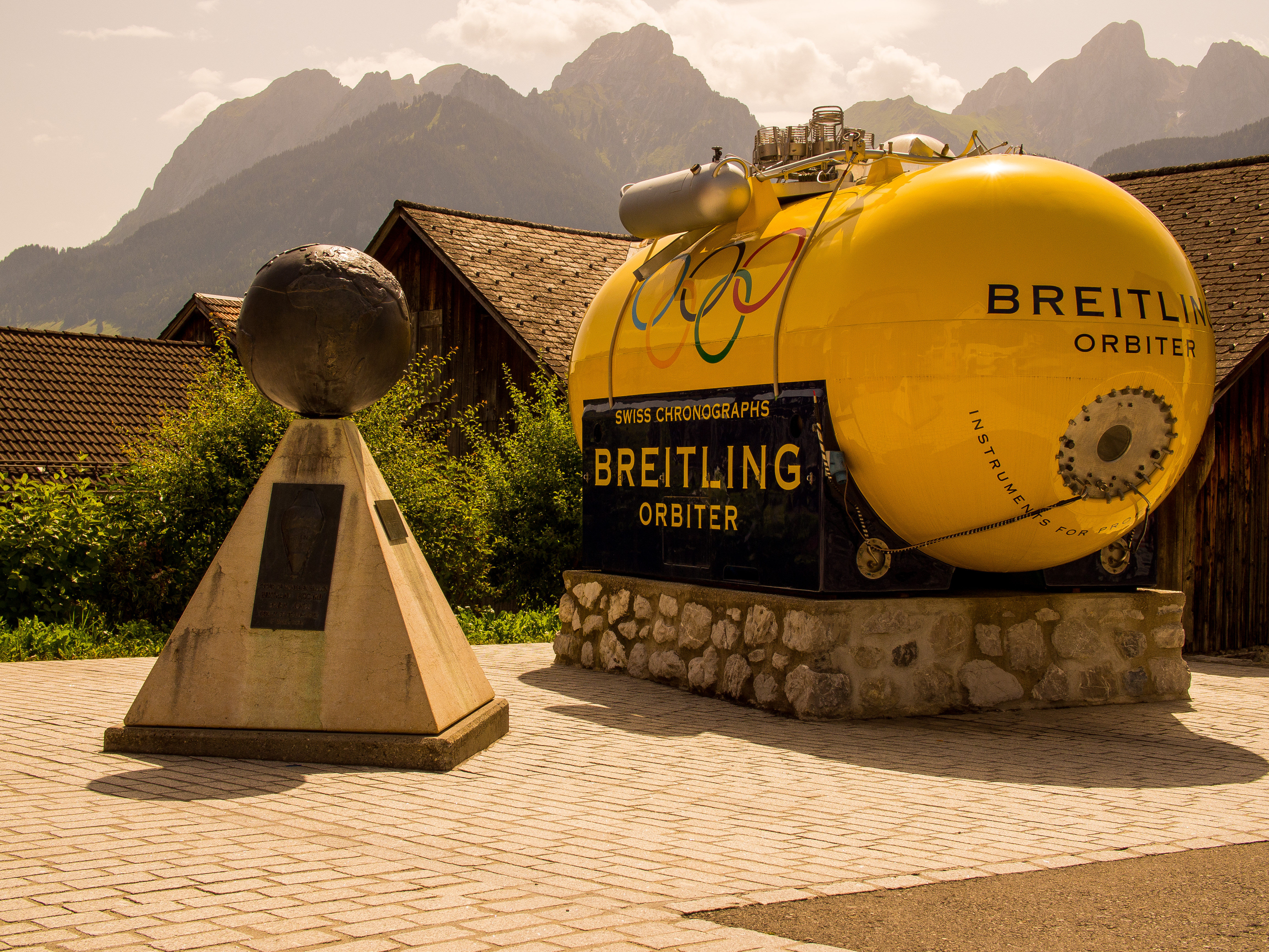 Breitling Orbiter - balon, którym Bertrand Piccard okrążył świat.